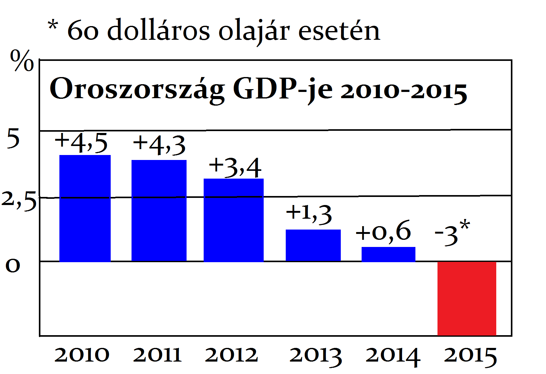 Oroszország GDP-je 2010-2015 között.